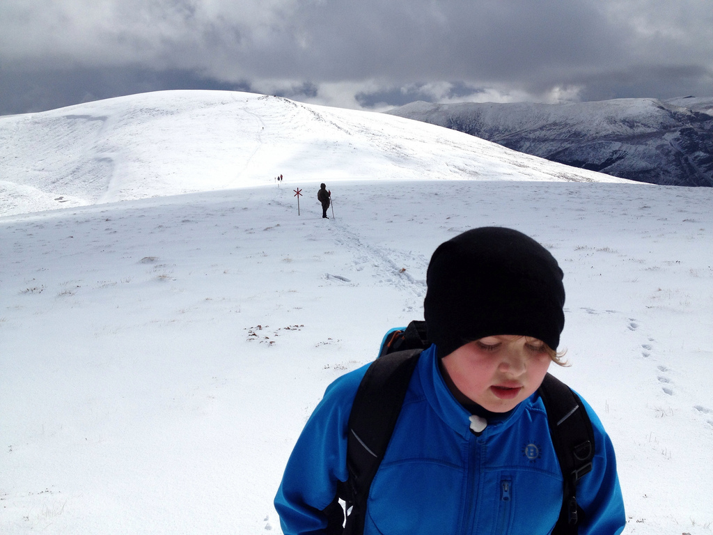 Bilde er tatt frå Rett Vest løypa 2012